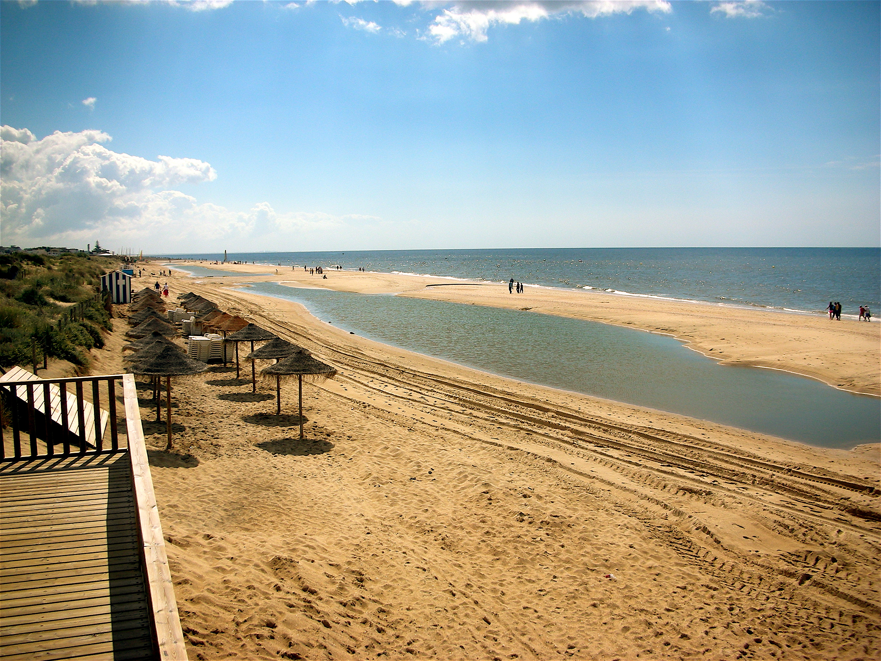 Playa de Islantilla en Huelva (España)Islantilla